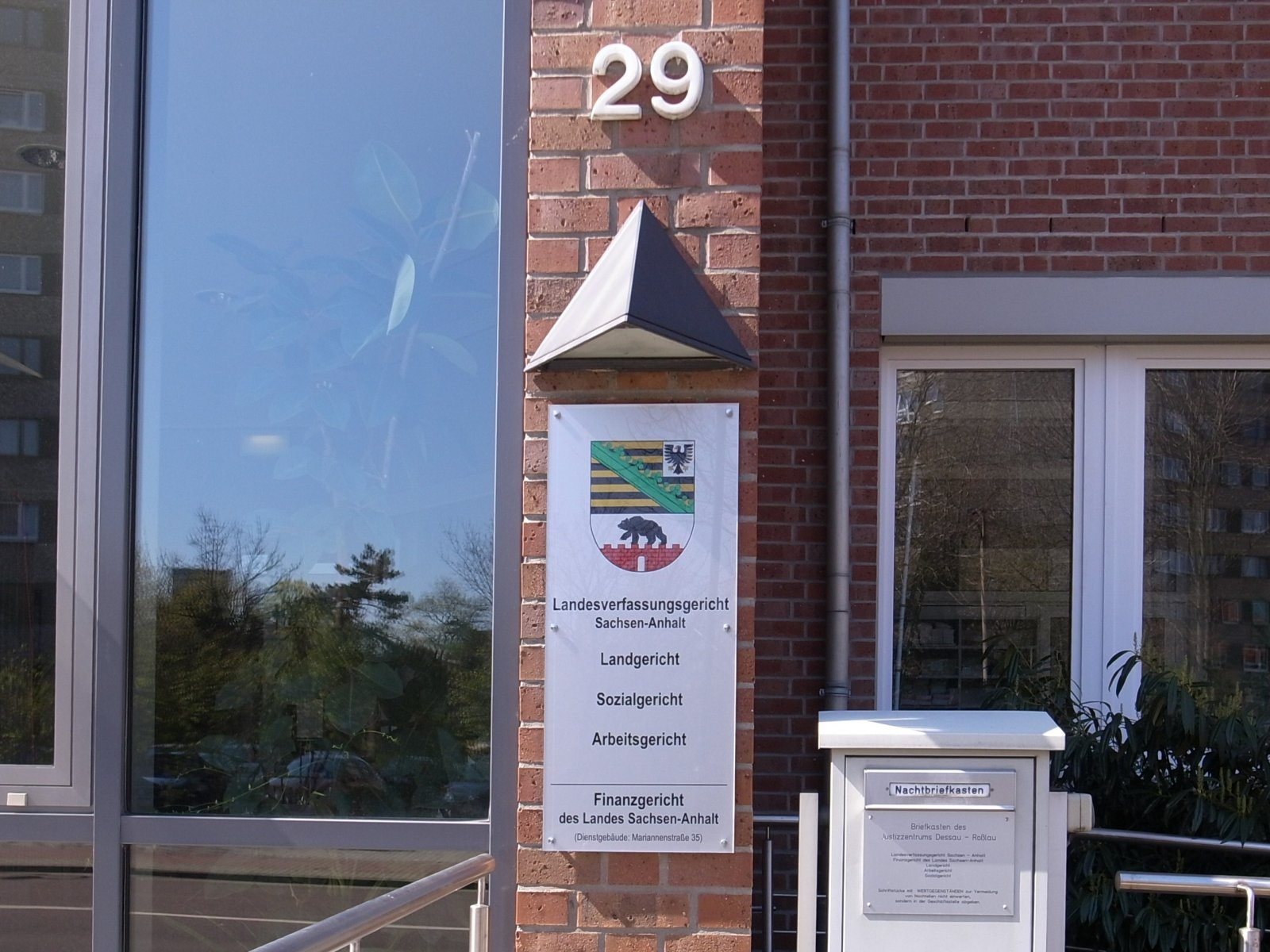 Justizzentrum Dessau-Roßlau, (Landesverfassungsgericht Sachsen-Anhalt,Landgericht, Sozialgericht, Arbeitsgericht, Finanzgericht des Landes Sachsen-Anhalt)